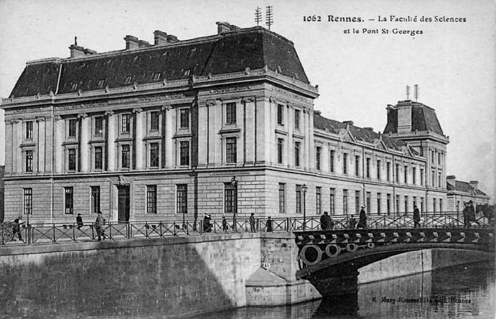 carte postale datée de 1905 représentant la faculté des Sciences de l'Université de Rennes. Le bâtiment fut par la suite utilisé par la faculté d'odontologie de la fin des années 1960 jusqu'en 2003.